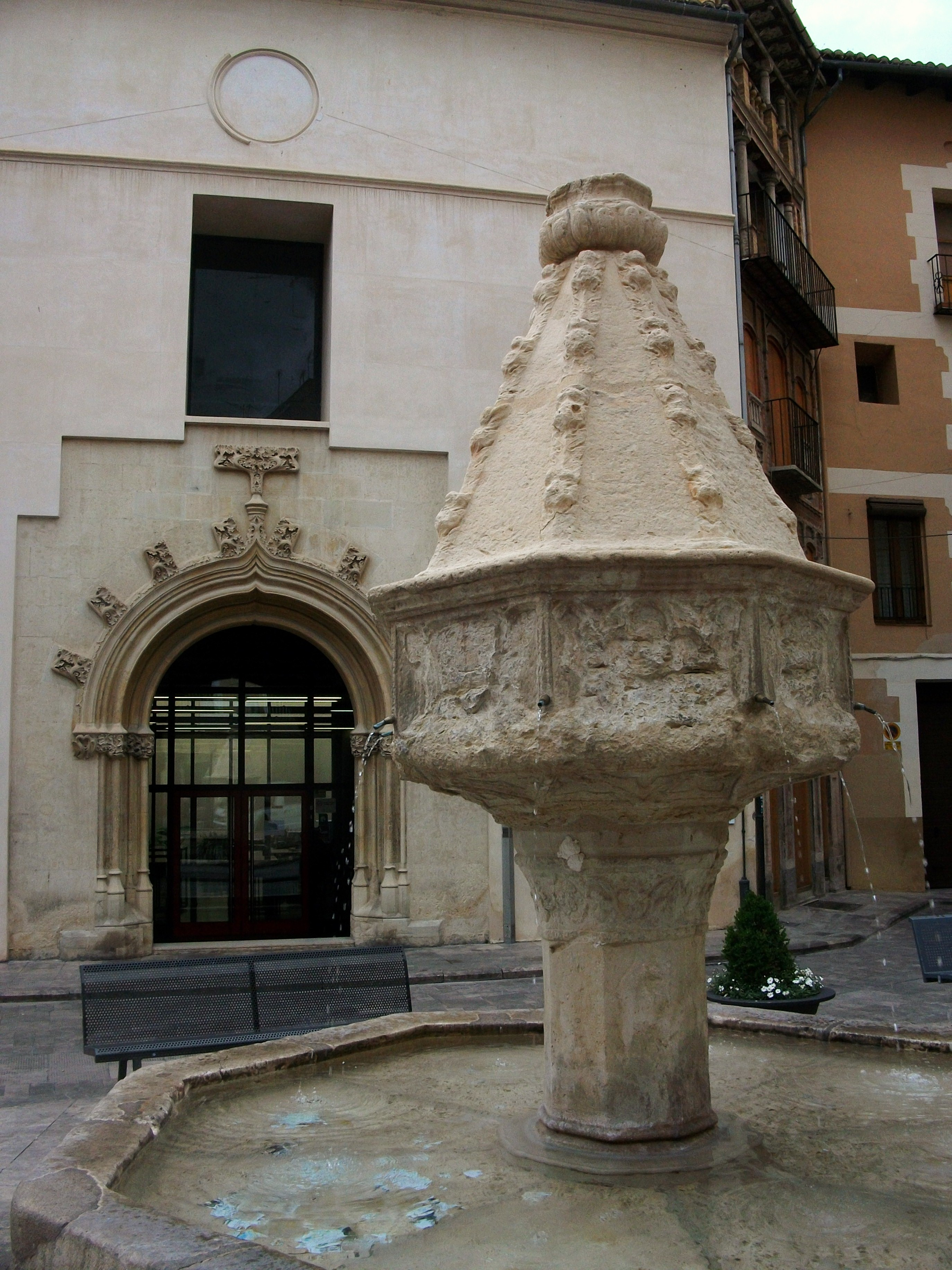 Font gòtica de la Trinitat, Xàtiva.